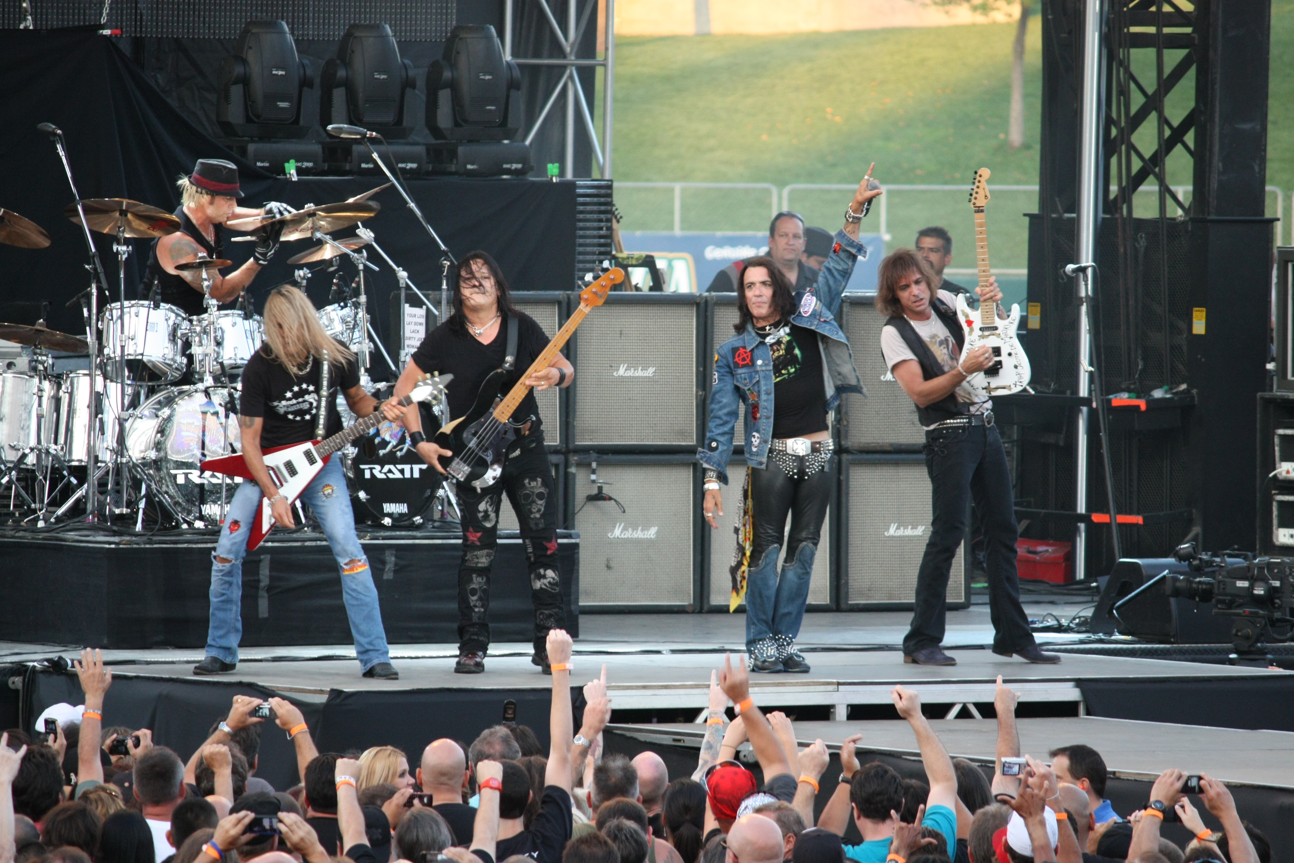 Глэм-метал группа Ratt